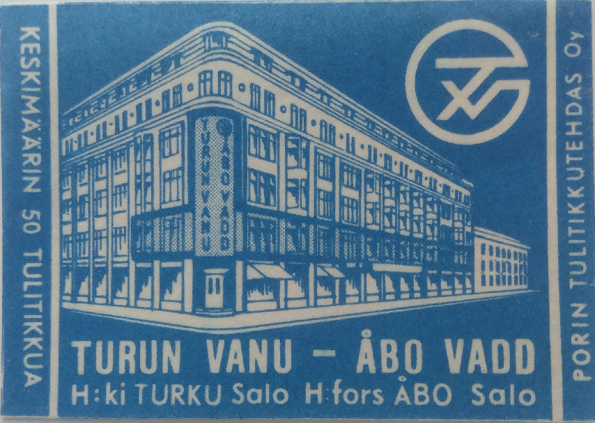 Turun Vanu tulitikuasi